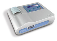 Eletrocardiógrafo (C30+)